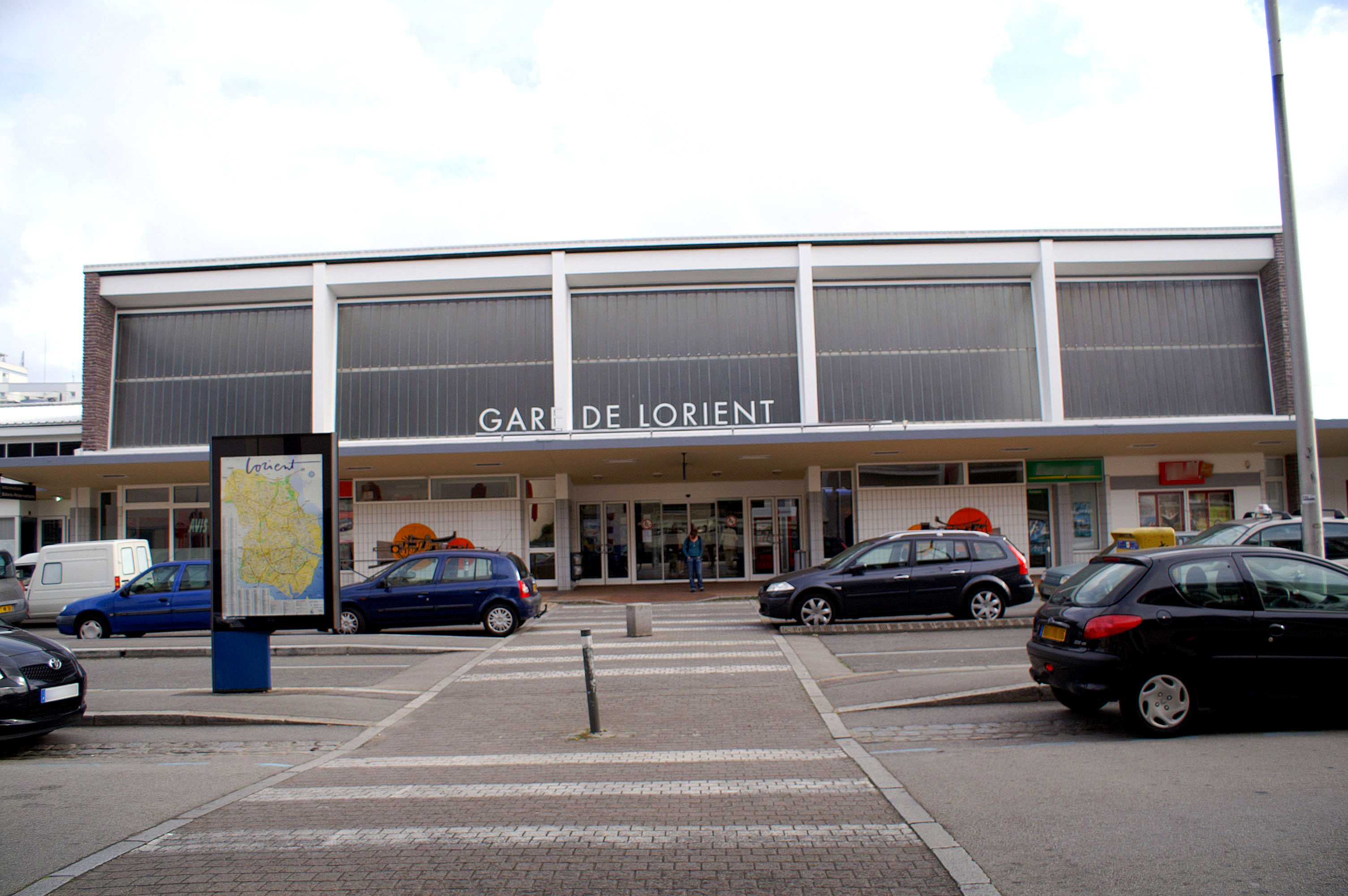 Gare de Lorient, bâtiment passager, vue côté ville.